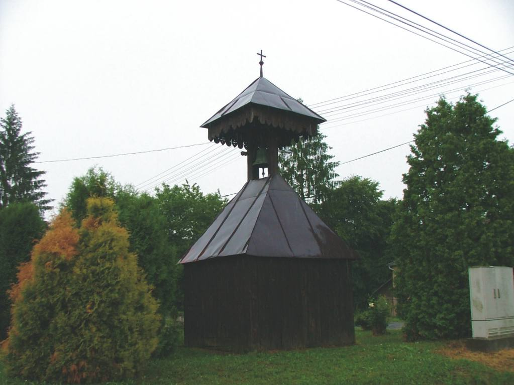 Szentpéterfölde. Göcseji típusú szoknyás harangláb a község központjában, saját kép